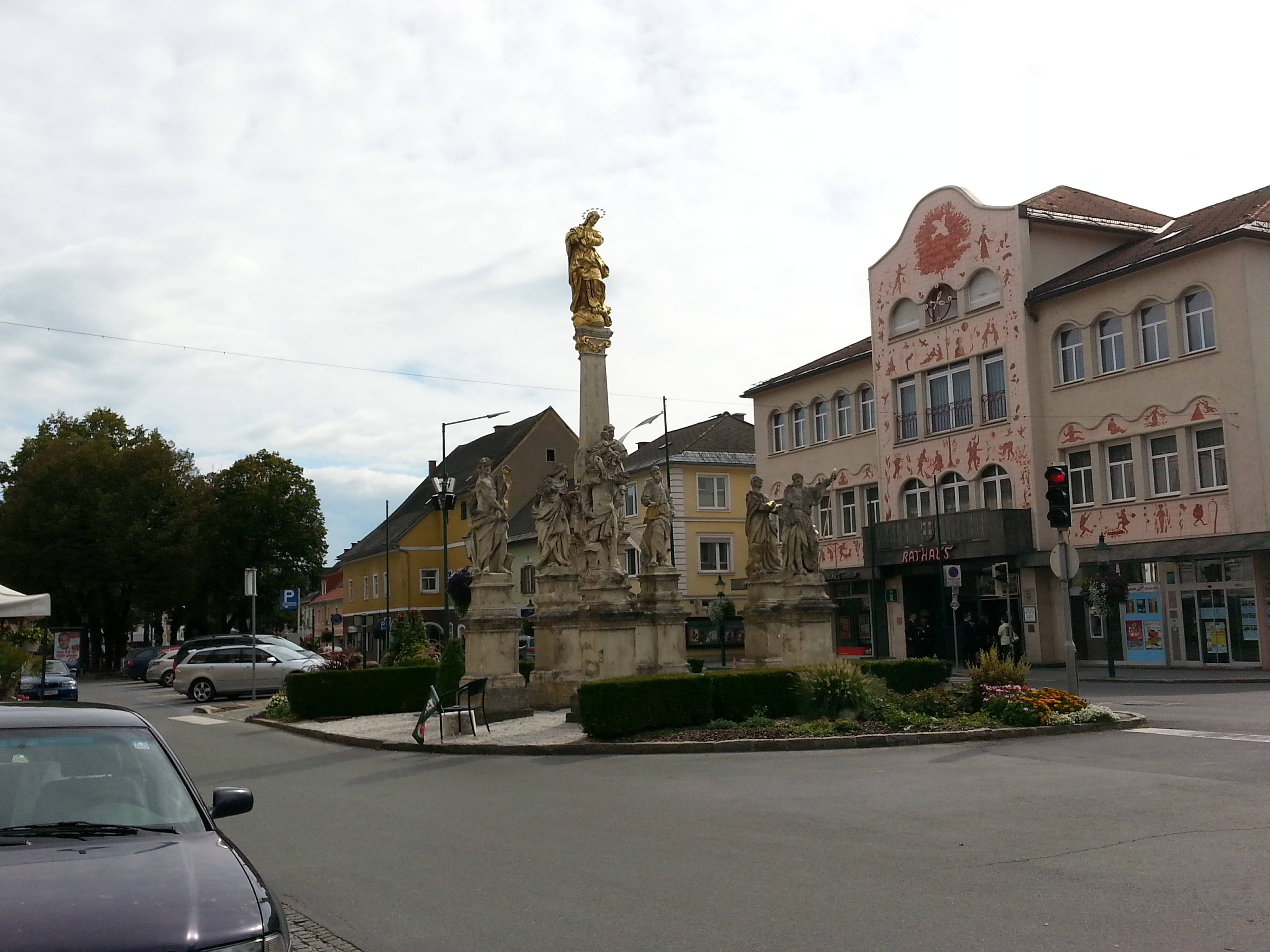 Mariensäule, dahinter das Rathaus mit der von Arik Brauer gestalteten Fassade